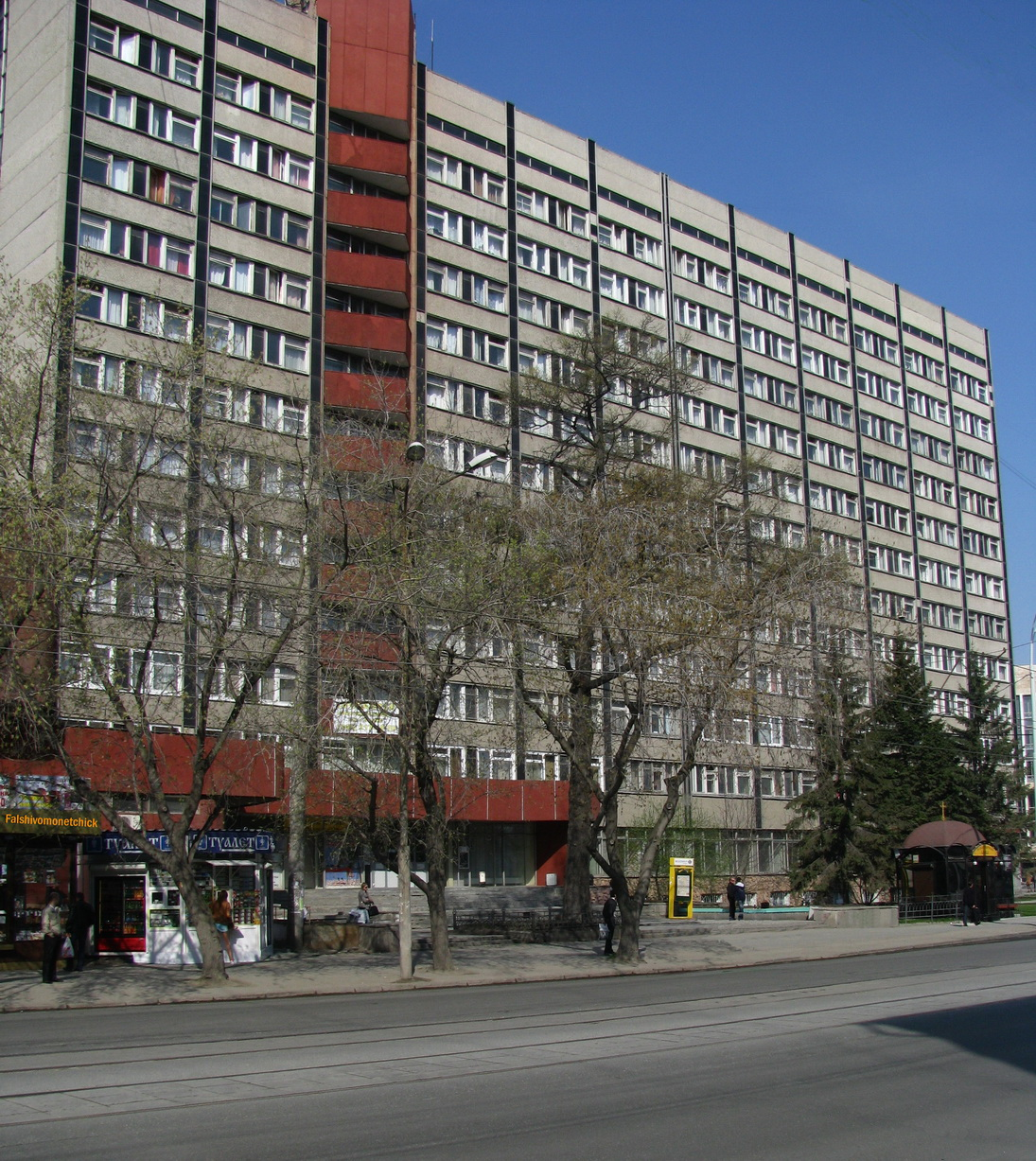 Общежитие гостиничного типа Уральской академии Государственной службы. Екатеринбург, 2011 г.